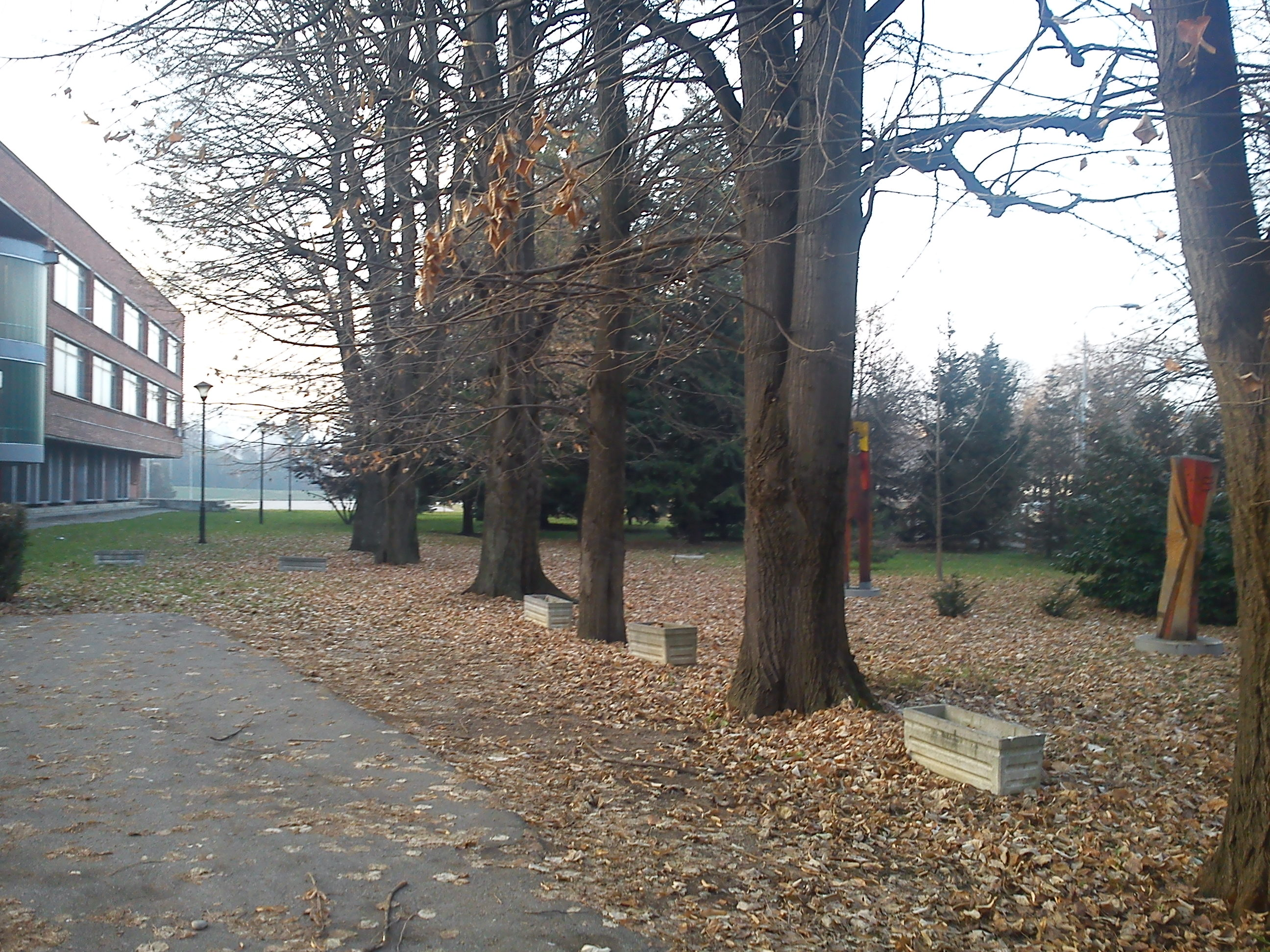 Parkić u okviru dvorišta Gimnazije u Banjoj Luci